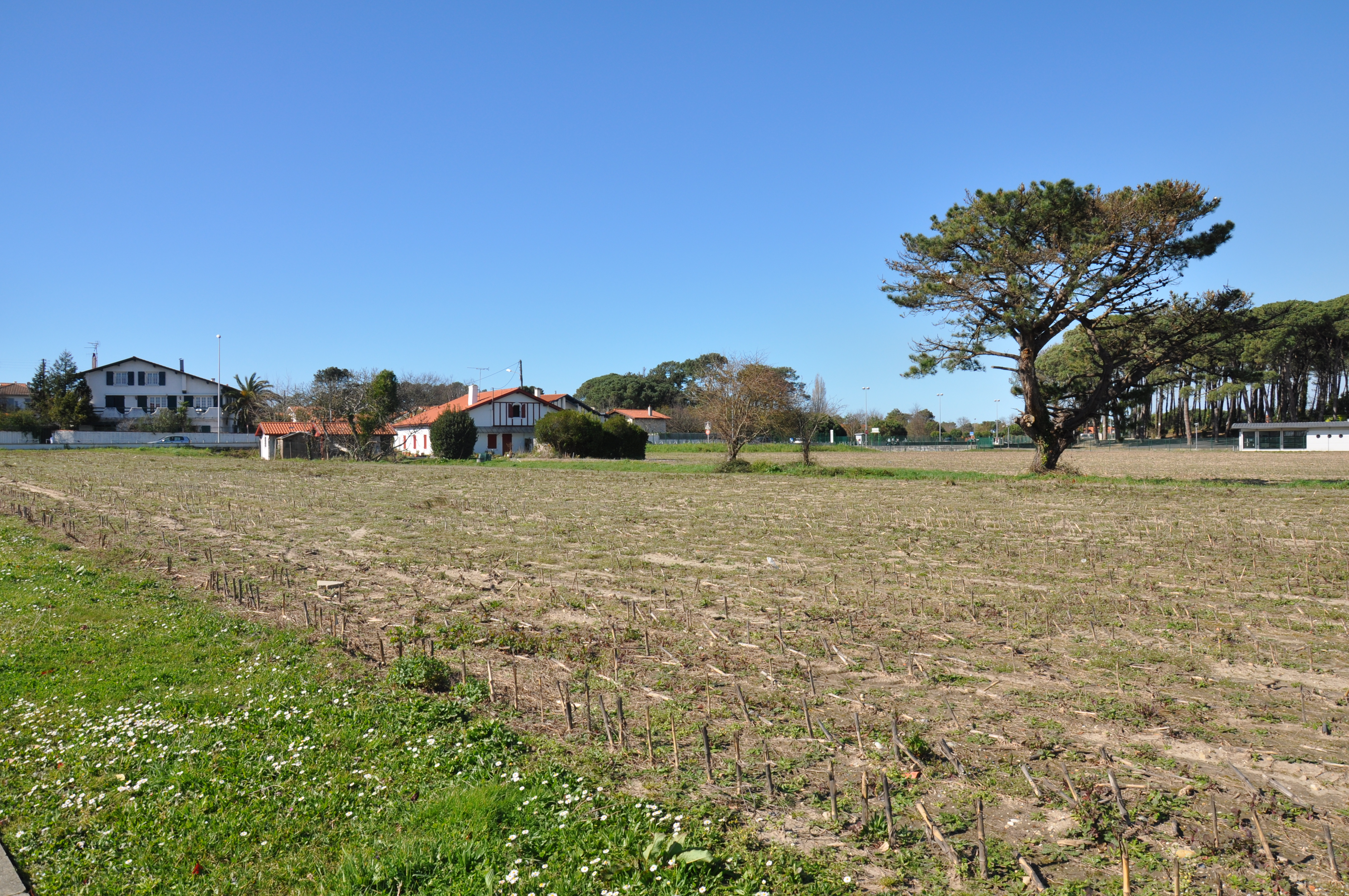 Ferme Anglet